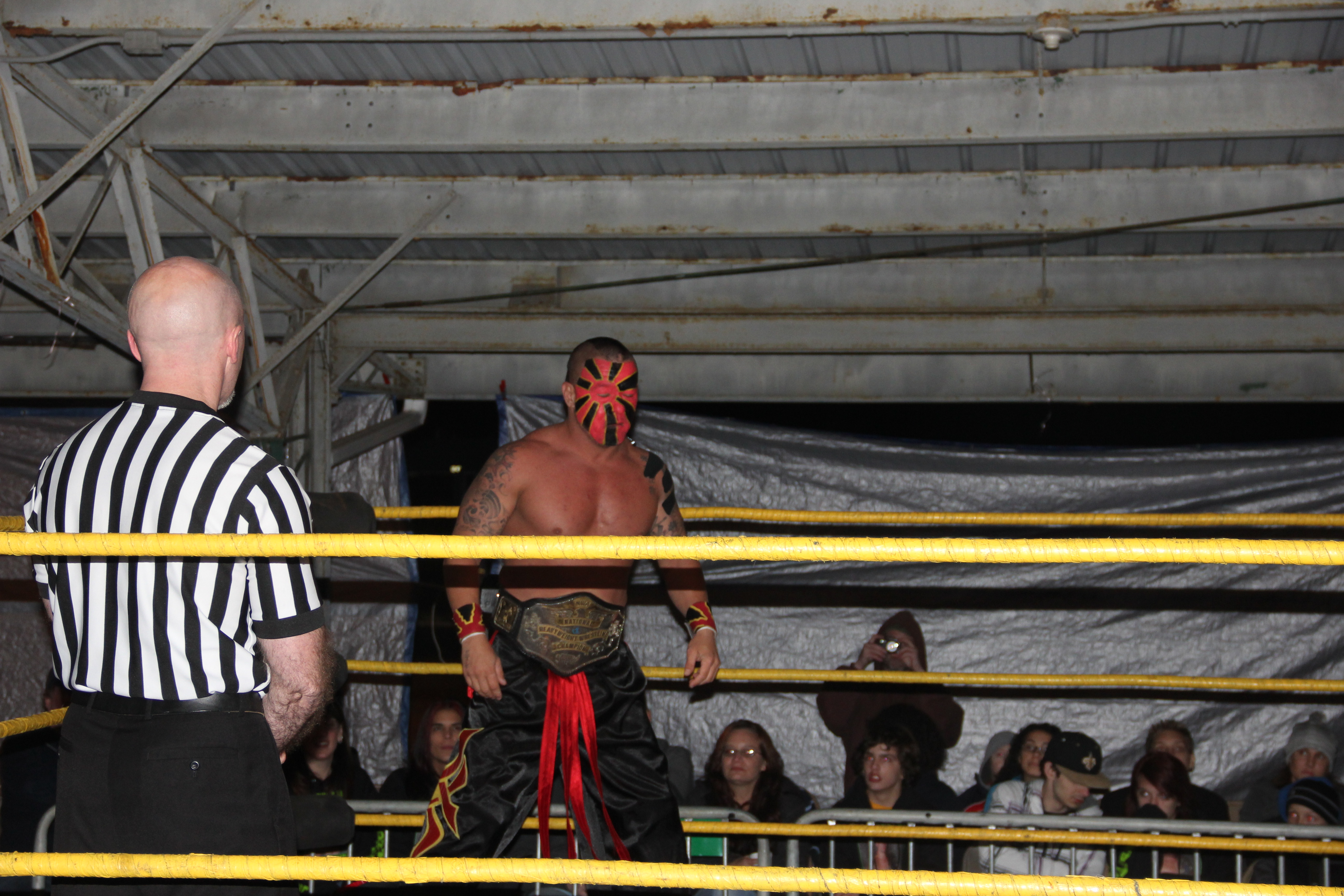 kahagas